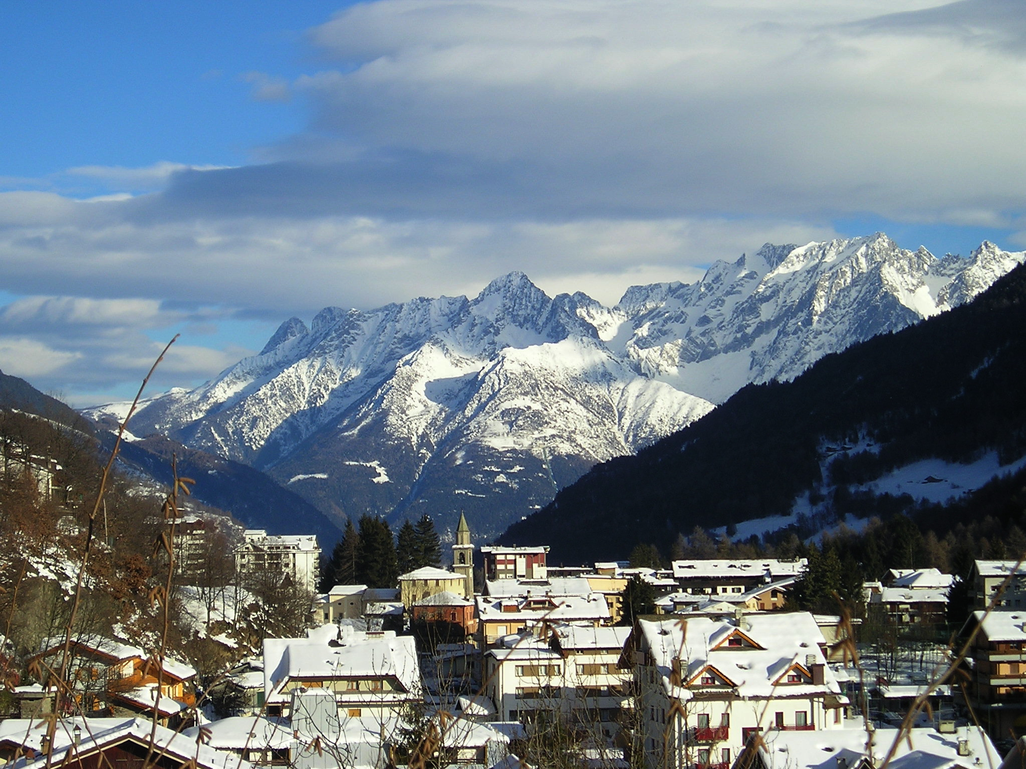 Foto del passo del Adamello e del Passo dell'Aprica, Autore Massimo Macconi, gennaio 2004